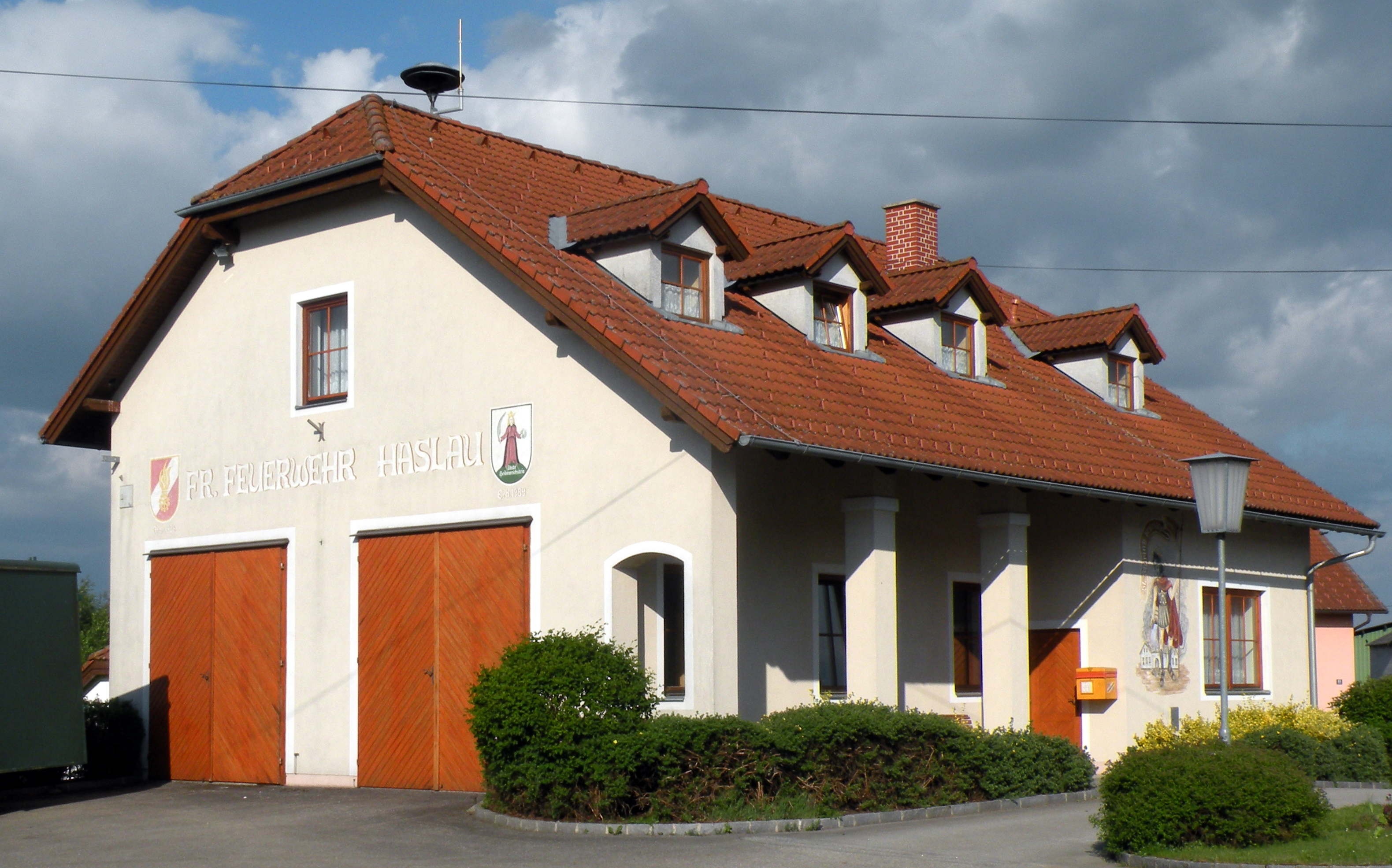 Feuerwehrzeughaus Haslau in Haslau, Heidenreichstein